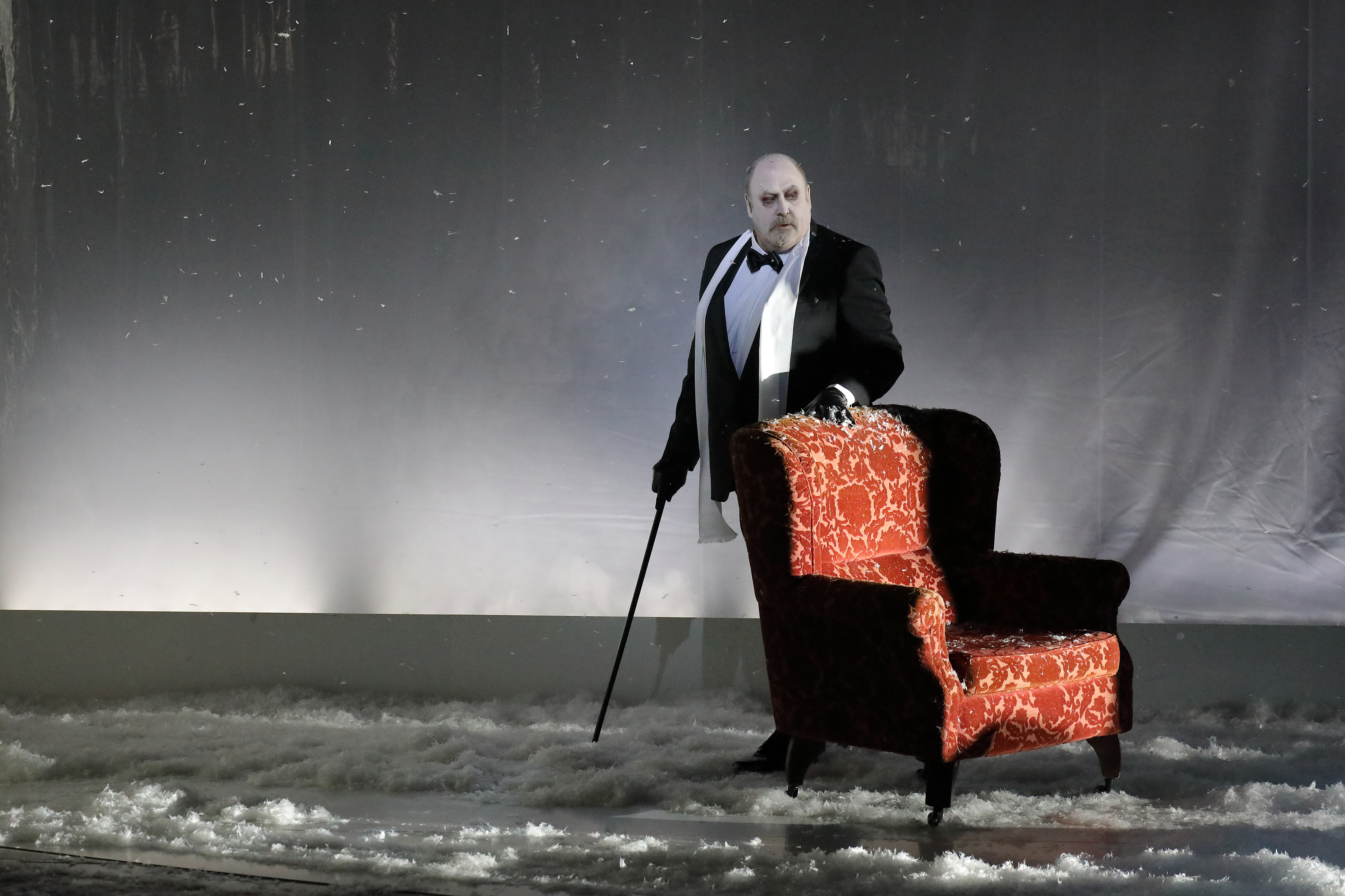 The Snow Queen 2019 an der Bayerischen Staatsoper (Snow Queen: Peter Rose) in einer Inszenierung von Andreas Kriegenburg (Foto: Wilfried Hoesl)